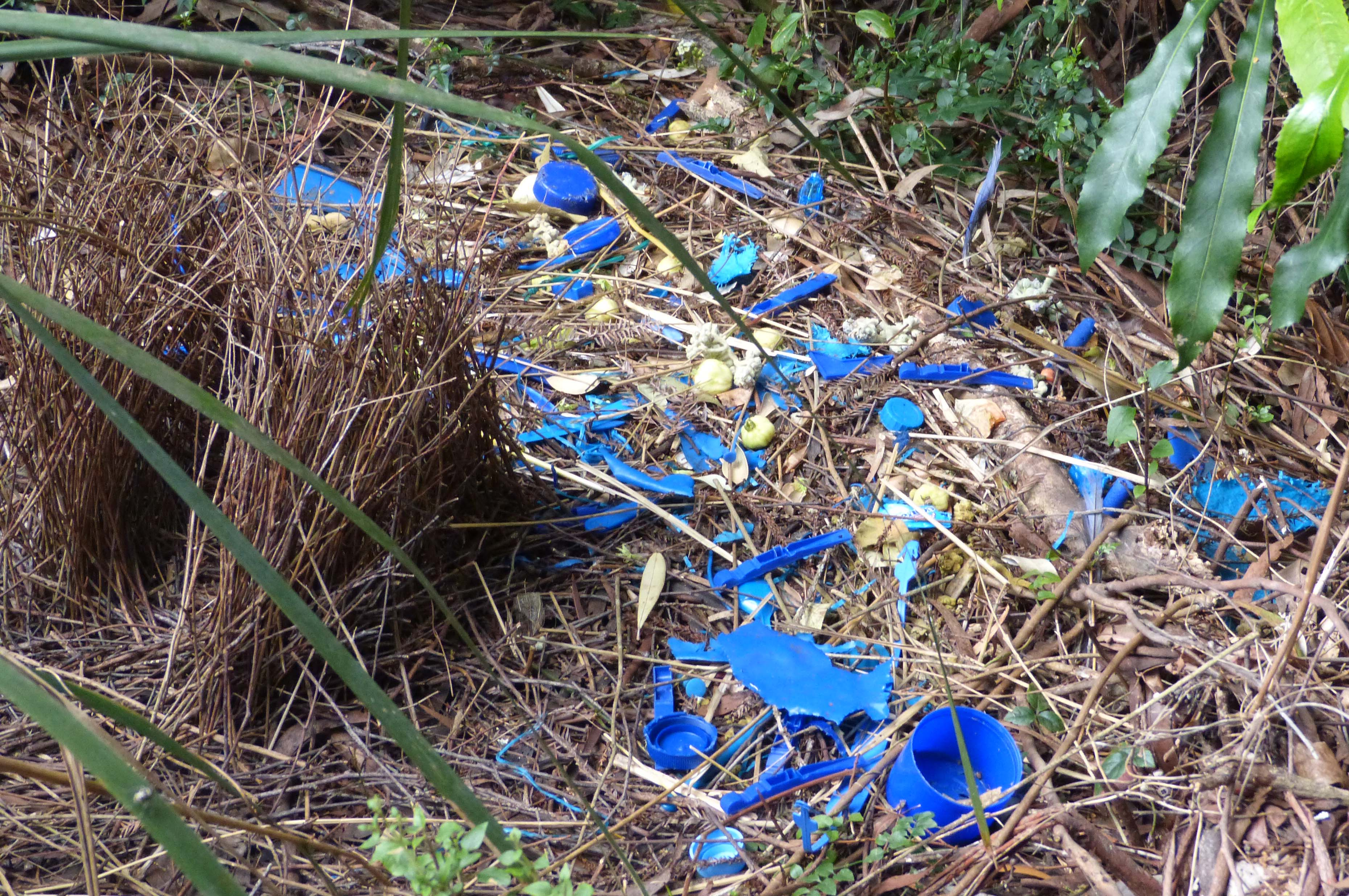 Springbrook. Lamington N.P. QLD